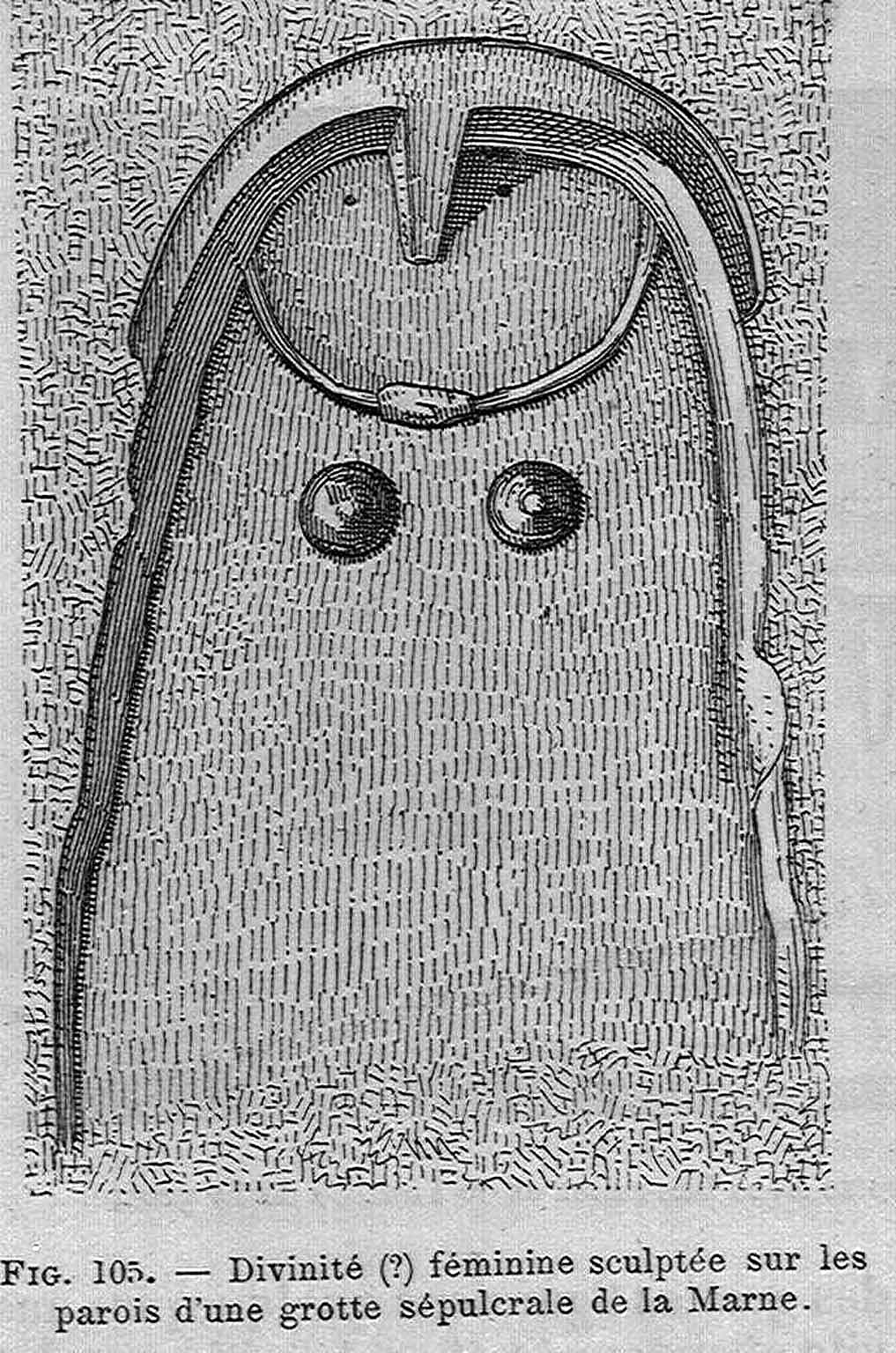 Divinité (?) féminine sculptée sur les parois d'une grotte sépulcrale de la Marne. [Grotte du groupe de Razet à Coizard.] " La France préhistorique, d'après les sépultures et les monuments " / Emile Cartailhac. - Paris : F. Alcan, 1889. Fig. 105; Titre donné par le catalogueur.